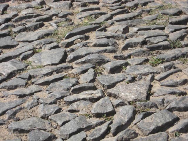 Calçamento de pedras típico do bairro Coqueiros em Belo Horizonte, Minas Gerais, Brasil